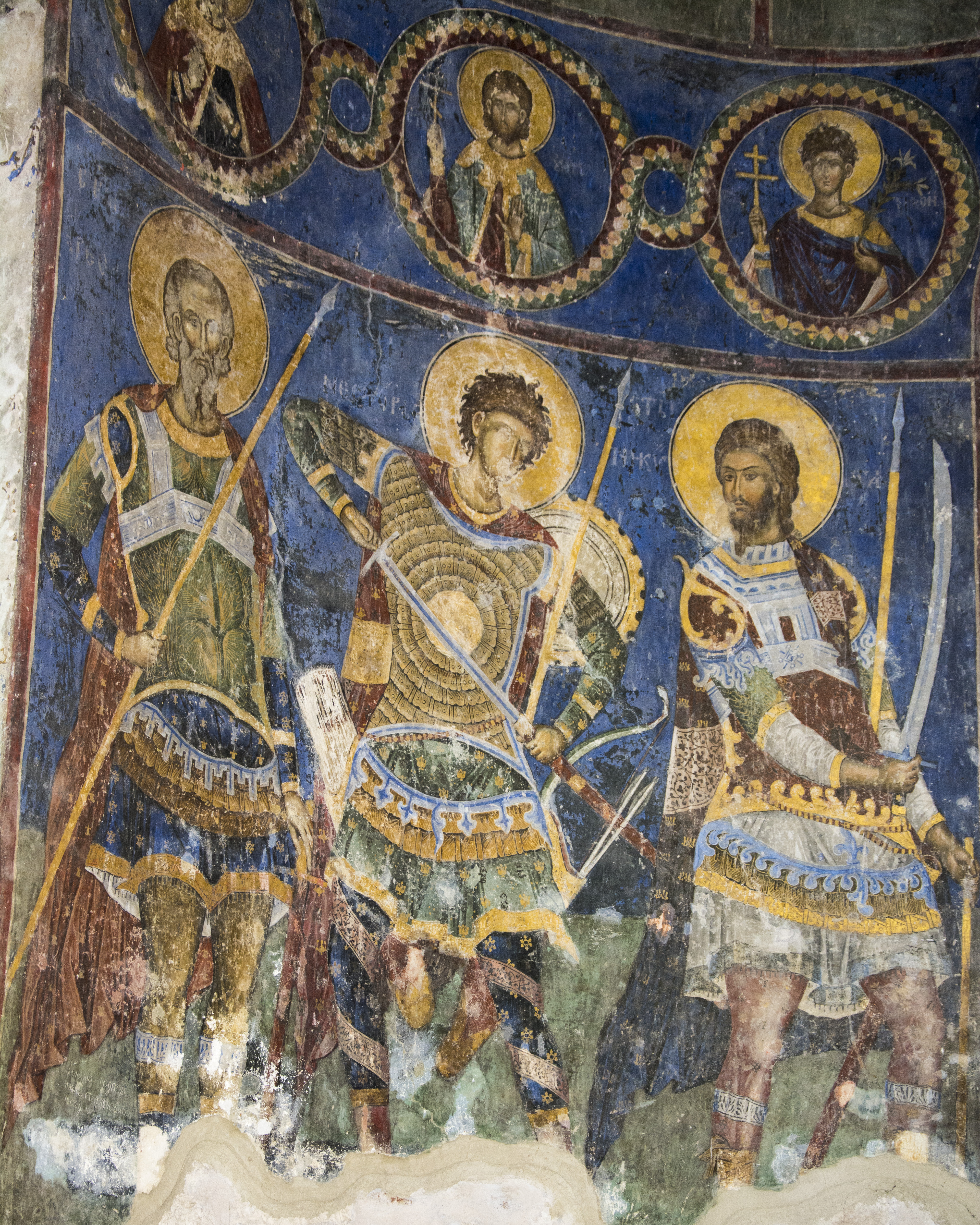 Фреска светих ратника у цркви Св. Тројице (манастир Манасија)